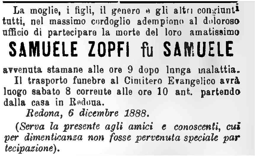 Necrologio di Samuele Zopfi apparso sulla Gazzetta provinciale di Bergamo del 6 dicembre 1888